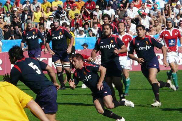 Matthieu Lopez durante el partido del Seis Naciones B frente a Portugal